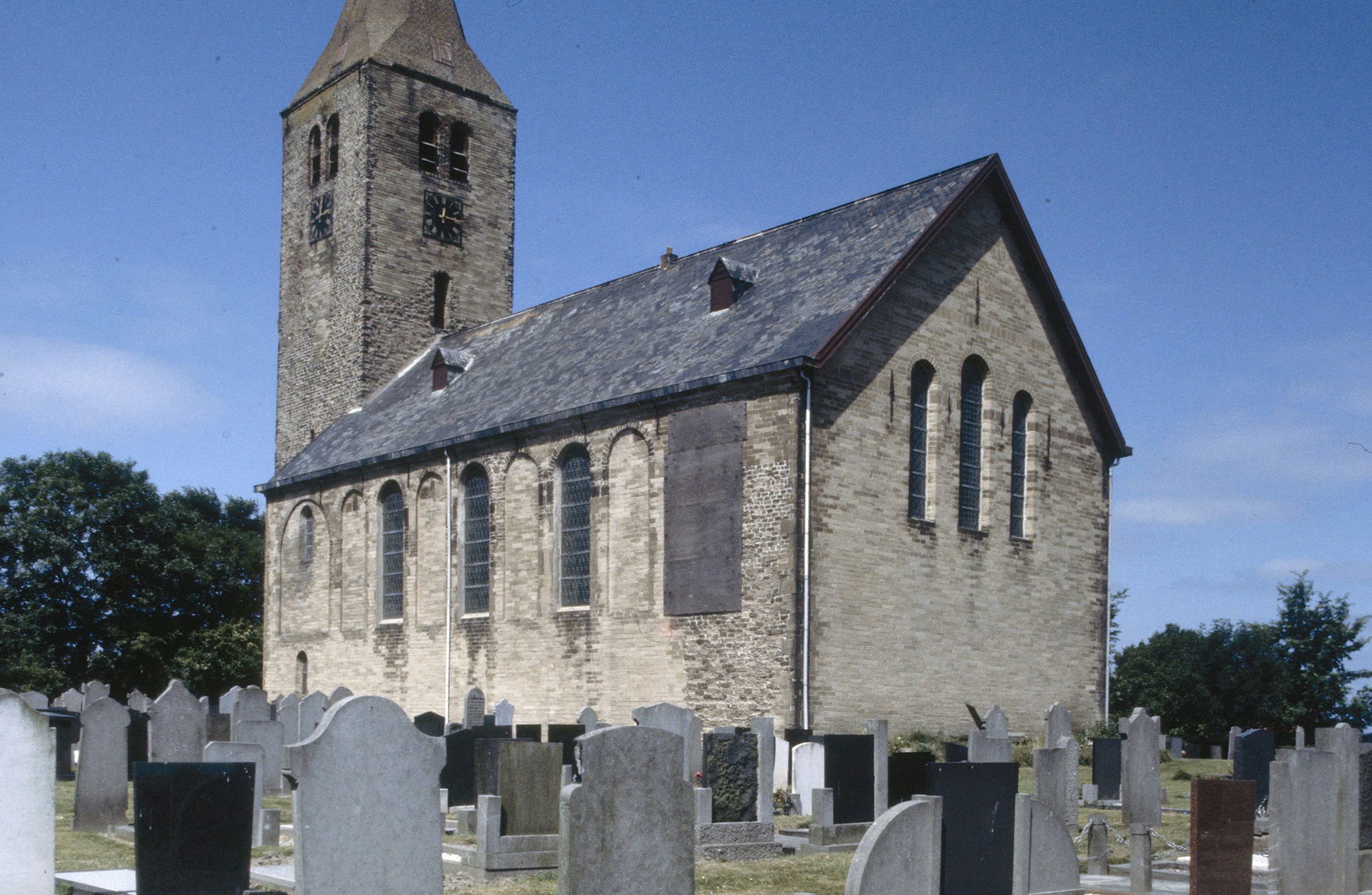 Nederlands Hervormde Kerk: Exterieur OVERZICHT ZUIDOOST ZIJDE